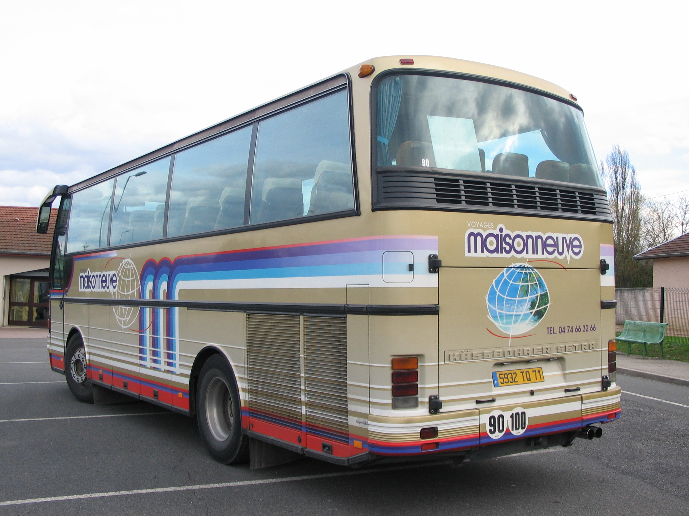 Setra 210 HD (1990) de dos.